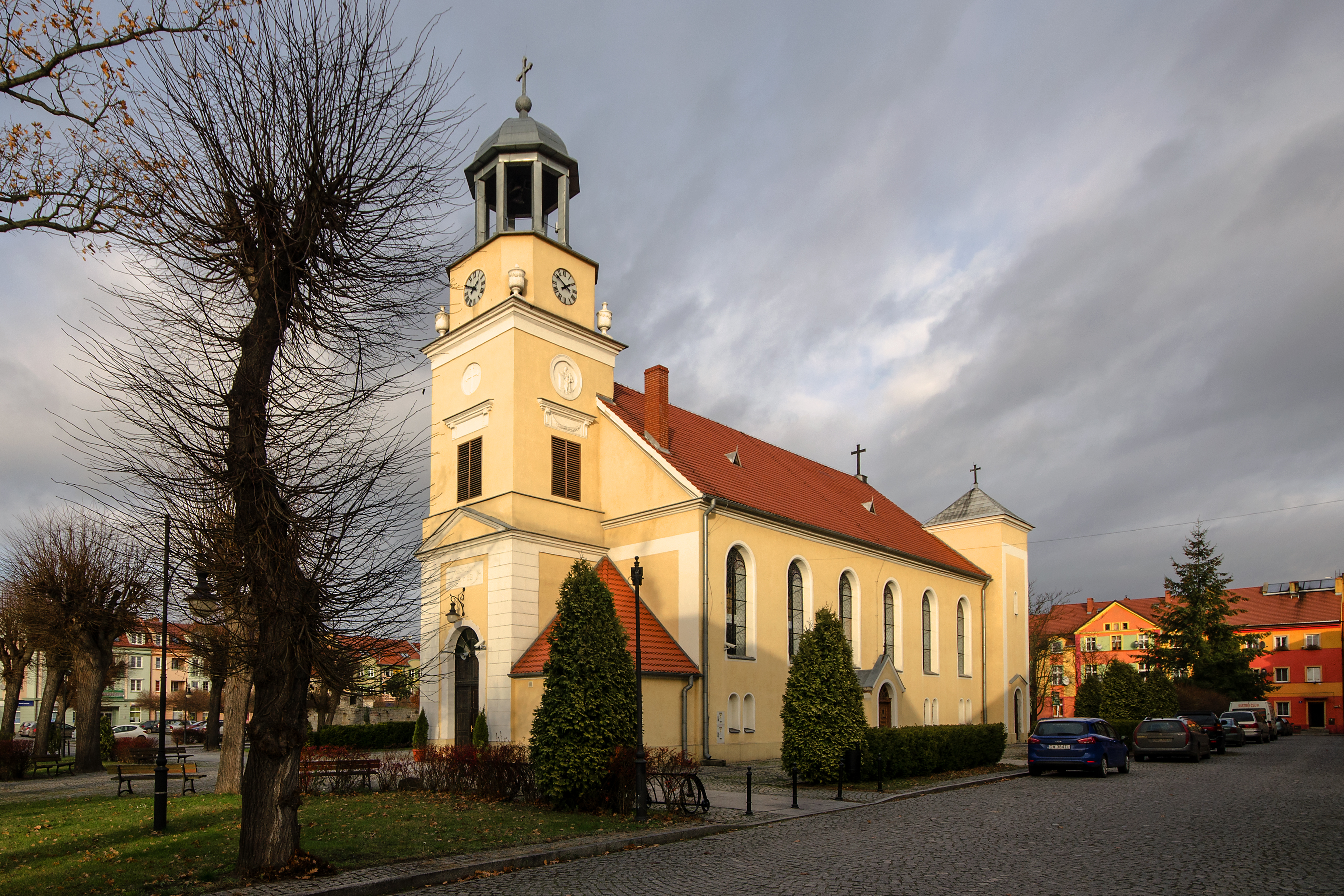 Brzeg Dolny, zbór ewangelicki, ob. kościół rzym.-kat. p.w. Matki Boskiej Szkaplerznej, 2 poł. XVIII, 1897-1899